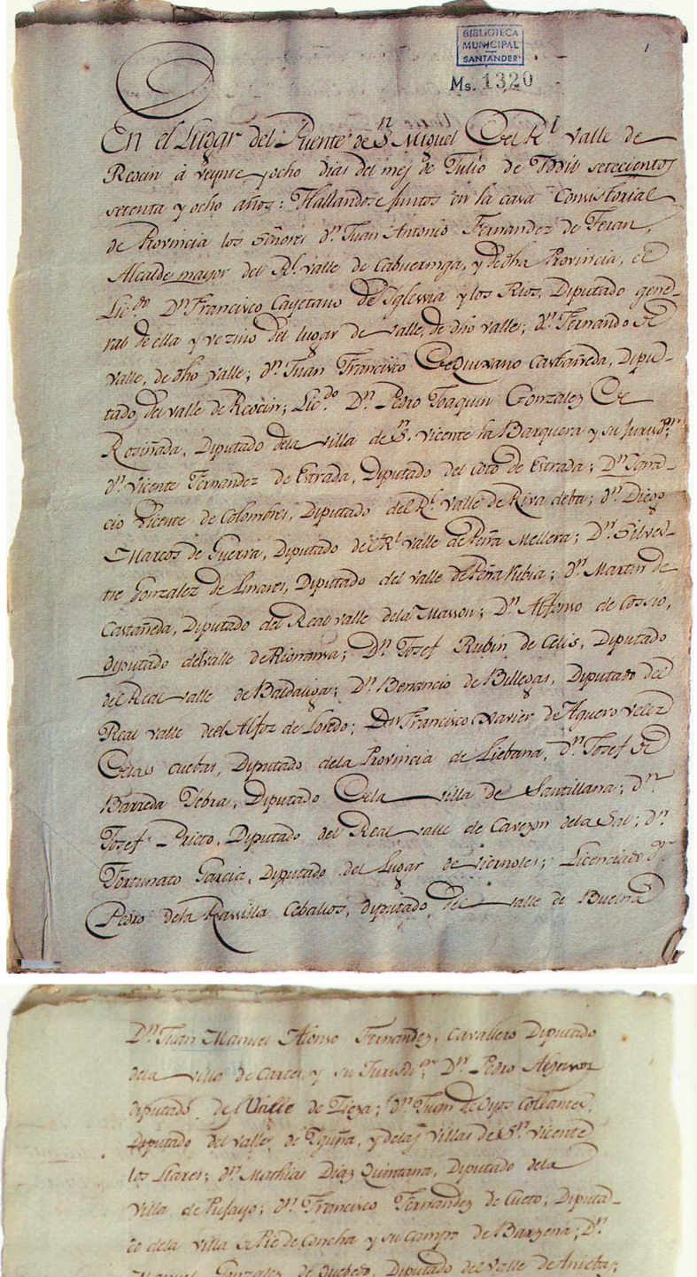 Acta creacion Provincia 1778